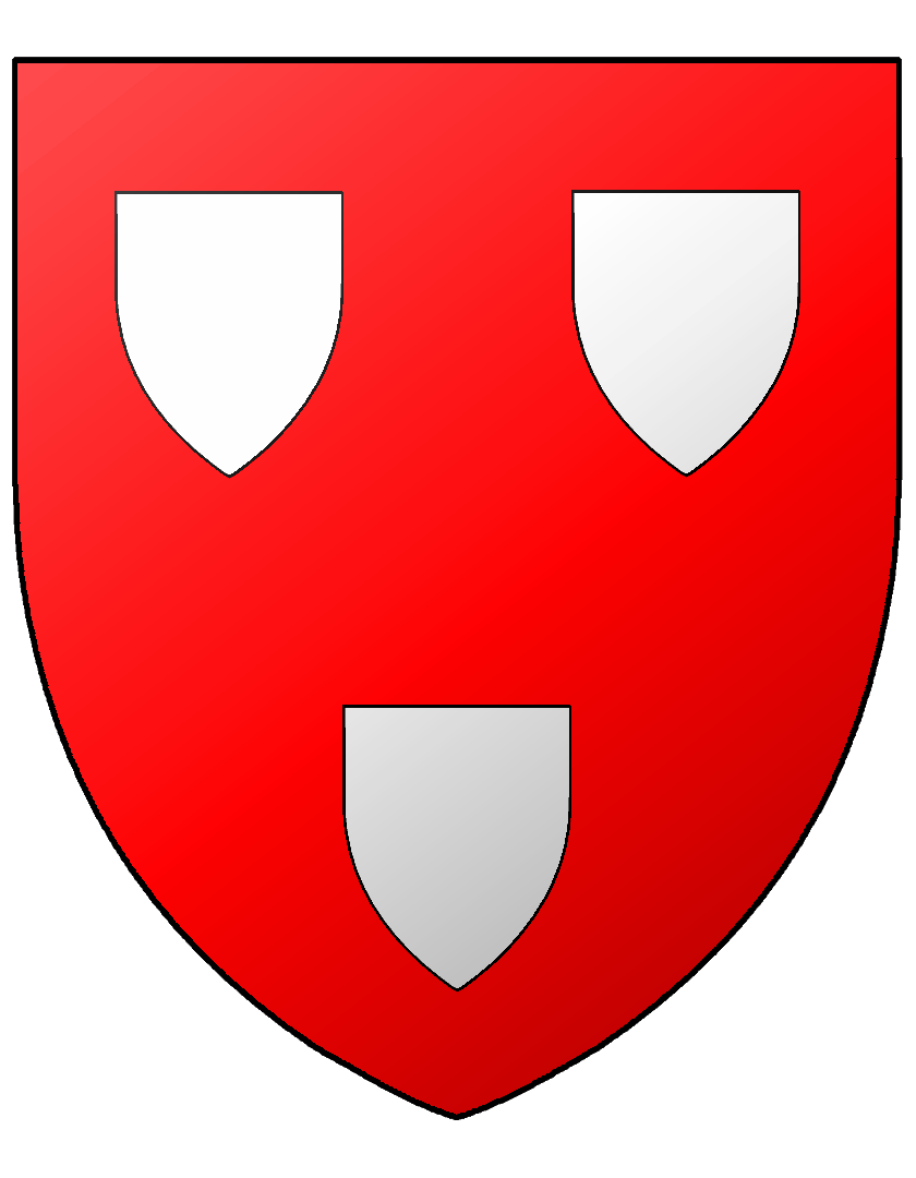 Blason des artistes allemands